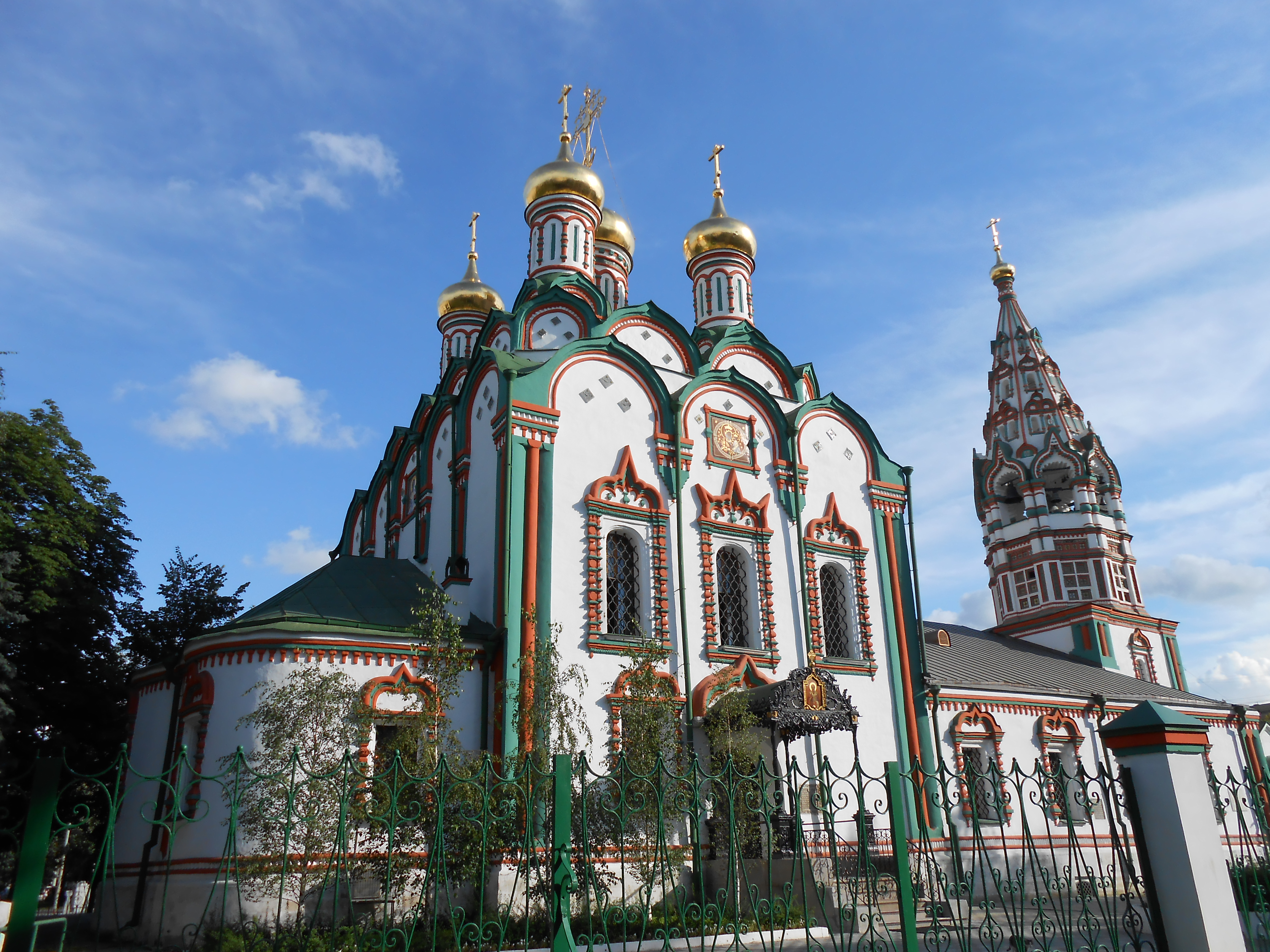 Церковь Николы в Хамовниках, г.Москва